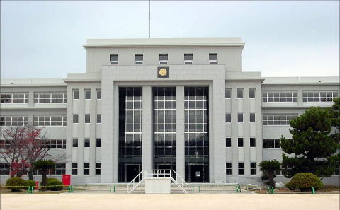 海上自衛隊第1術科学校学生館